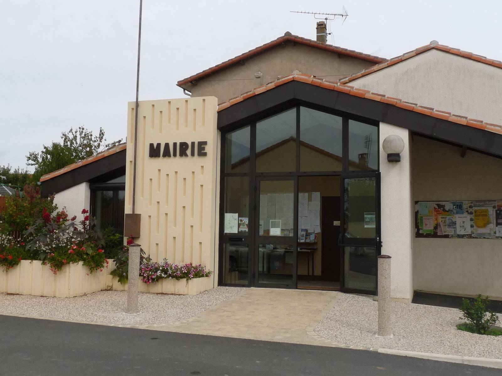 mairie de Bernac, Charente, France